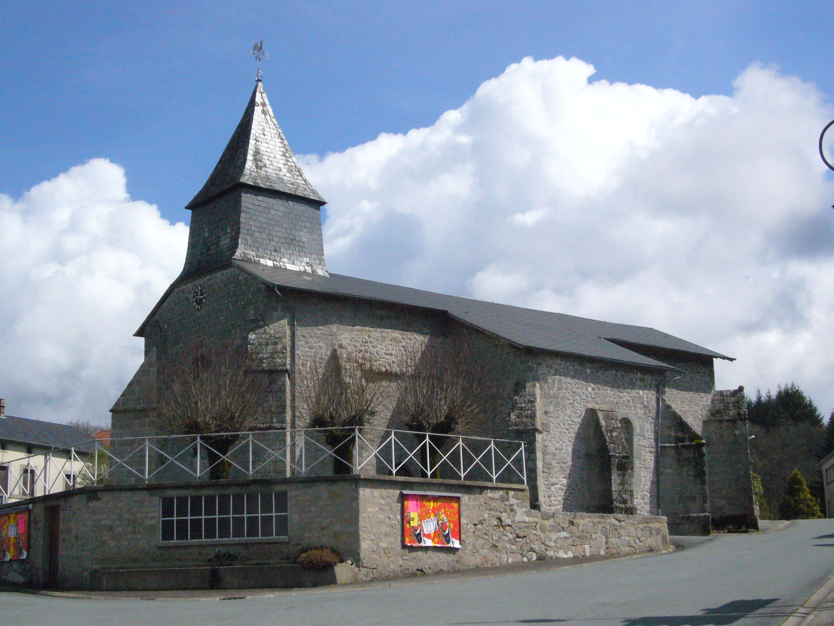 Eglise Saint-Léger de Saint-Léger-la-Montagne, Haute-Vienne, France